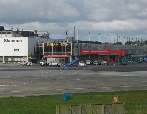 Летището на град Шанън